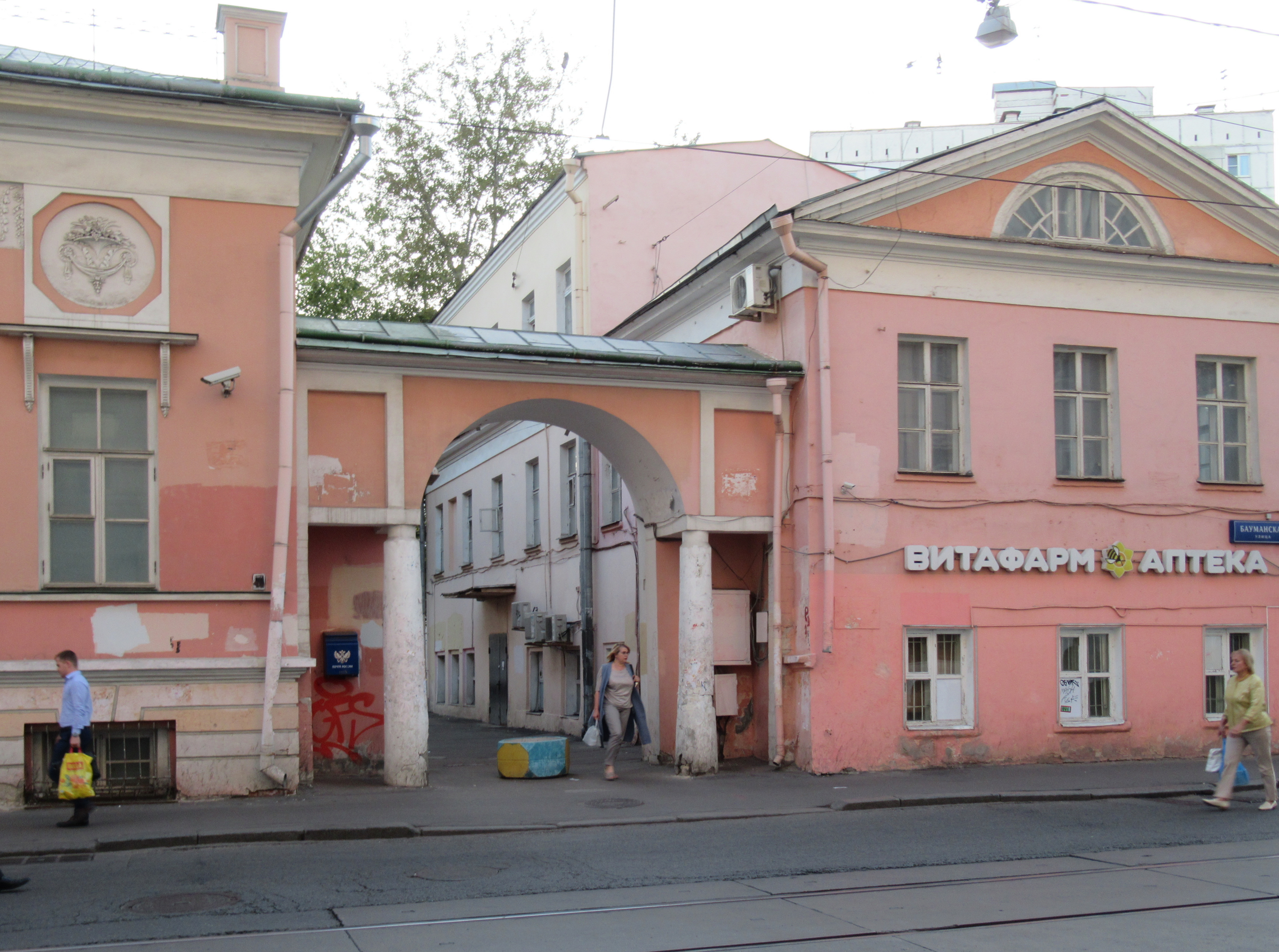 Ворота: Бауманская ул., дом 36, Басманный, Центральный округ, Москва